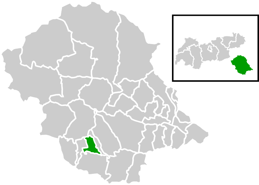 Lage der Gemeinde innerhalb des Bezirks Lienz